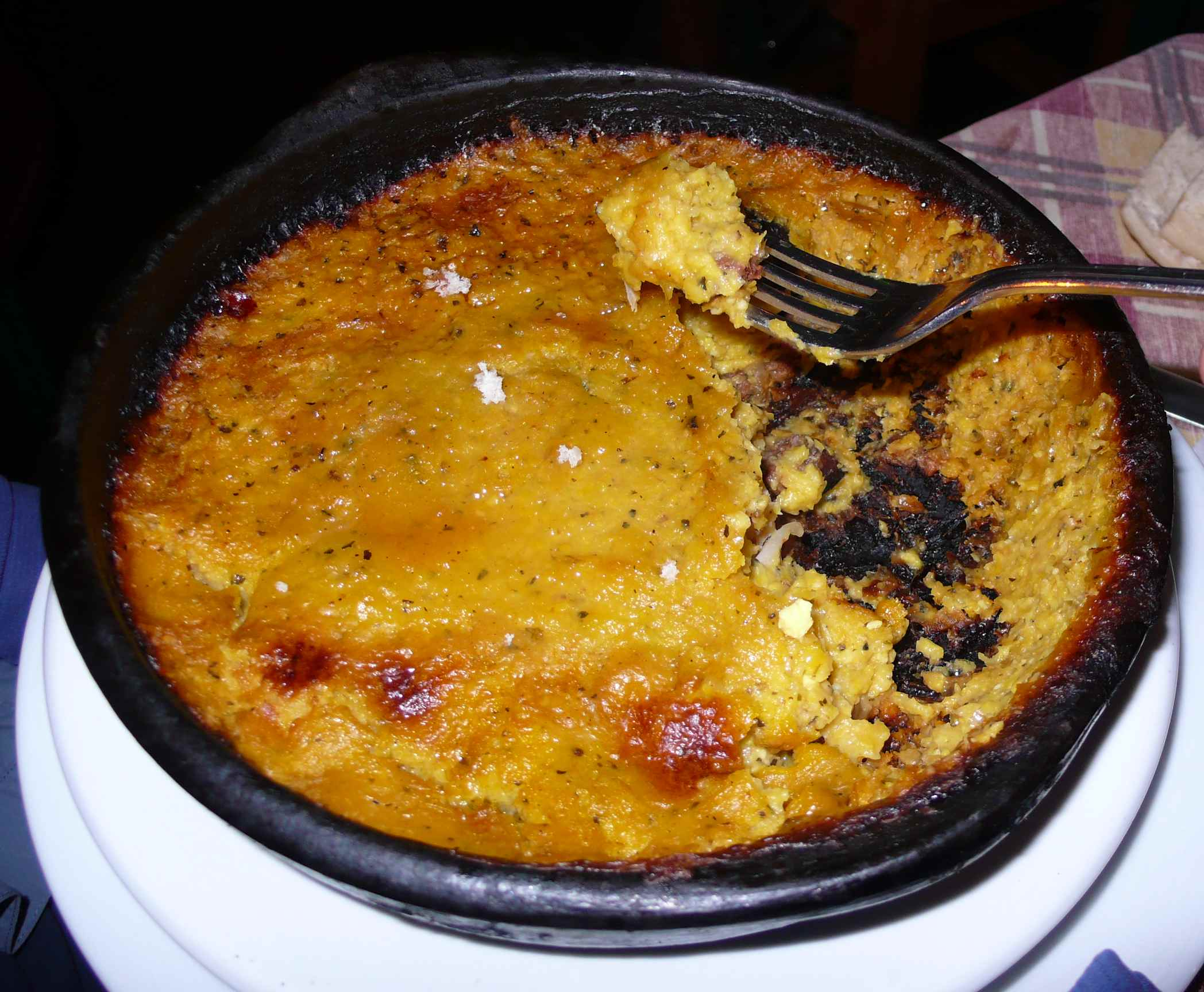 mmmm... que rico!!! (en el Galindo)